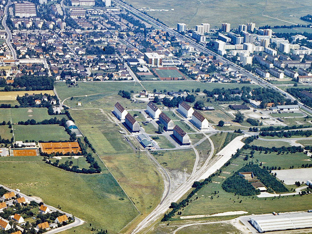 Virginia-Depot, Gesamtansicht des Geländes im Jahr 1979.